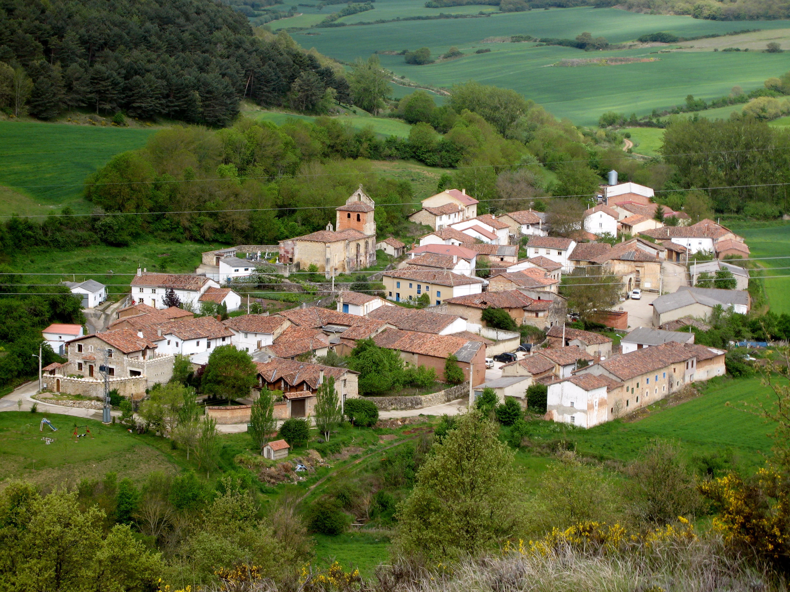 Barrio de San Pedro de la localidad de Becerril del Carpio, en el municipio de Alar del Rey, Palencia, Castilla y León, España